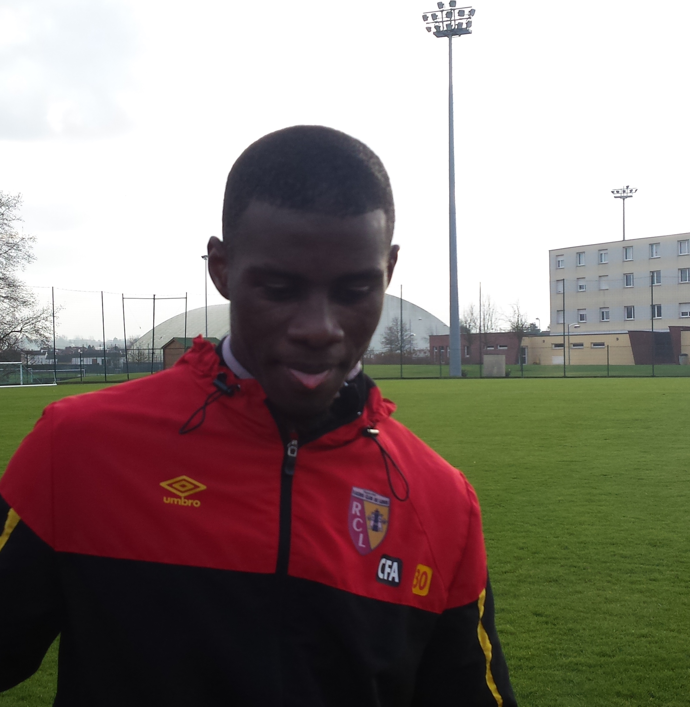 Alassane Touré après un entraînement public du Racing Club de Lens, le 31 décembre 2014, sur le terrain "San Siro" du Centre Technique et Sportif de La Gaillette